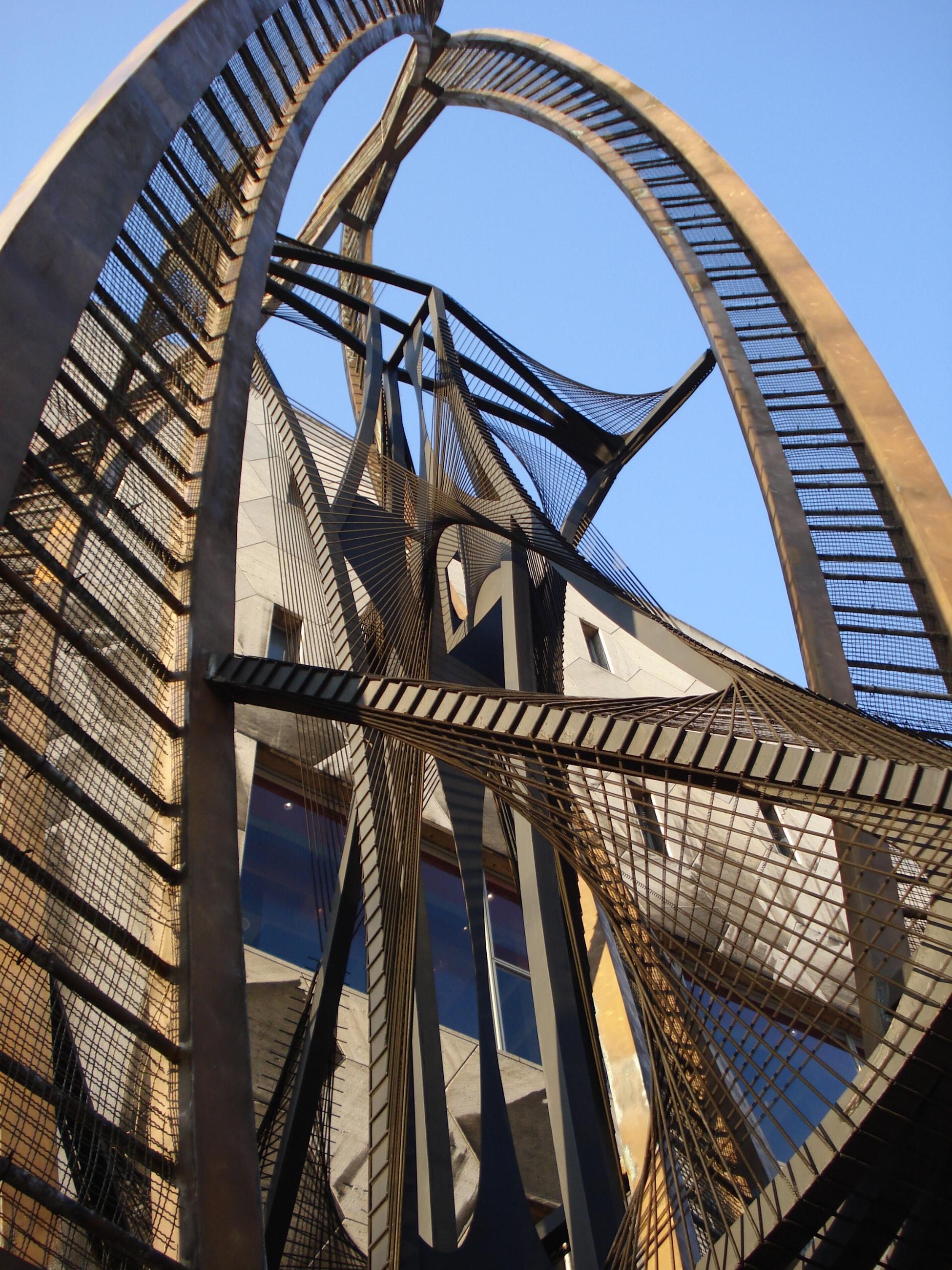 Rotterdam, Coolsingel. Kunstwerk "Gestileerde bloem" van Naum Gabo, detail. Rotterdam/The Netherlands.